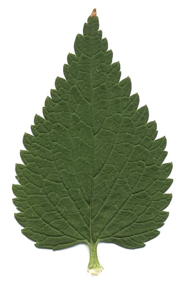 Lamium album - leaf (scan)